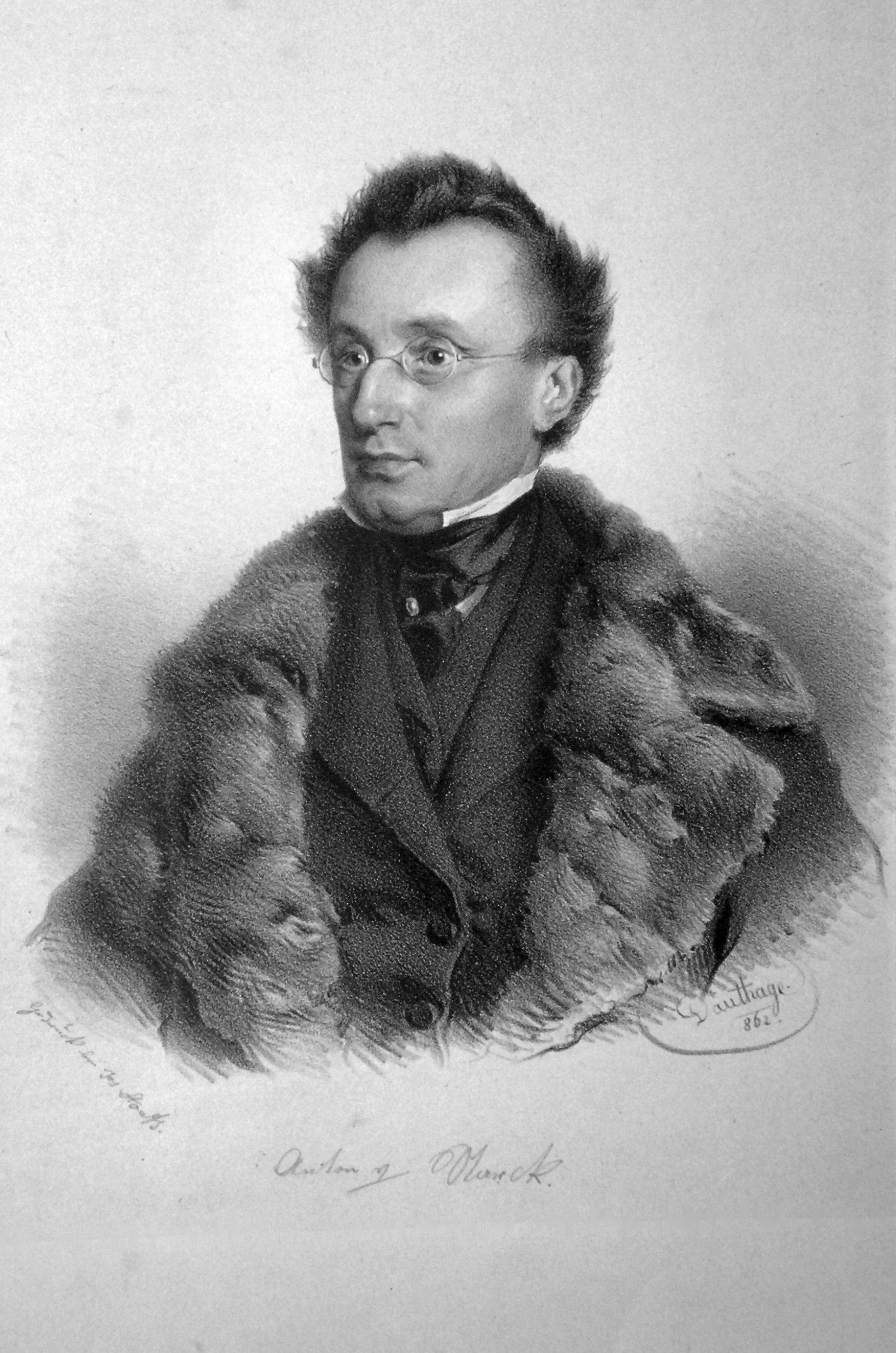 Johann Anton Freiherr von Starck (1808-1883), österreichischer Industrieller, Bergwerksbesitzer, Großgrundbesitzer und Reichstagsabgeordneter. Lithographie von Adolf Dauthage, 1862